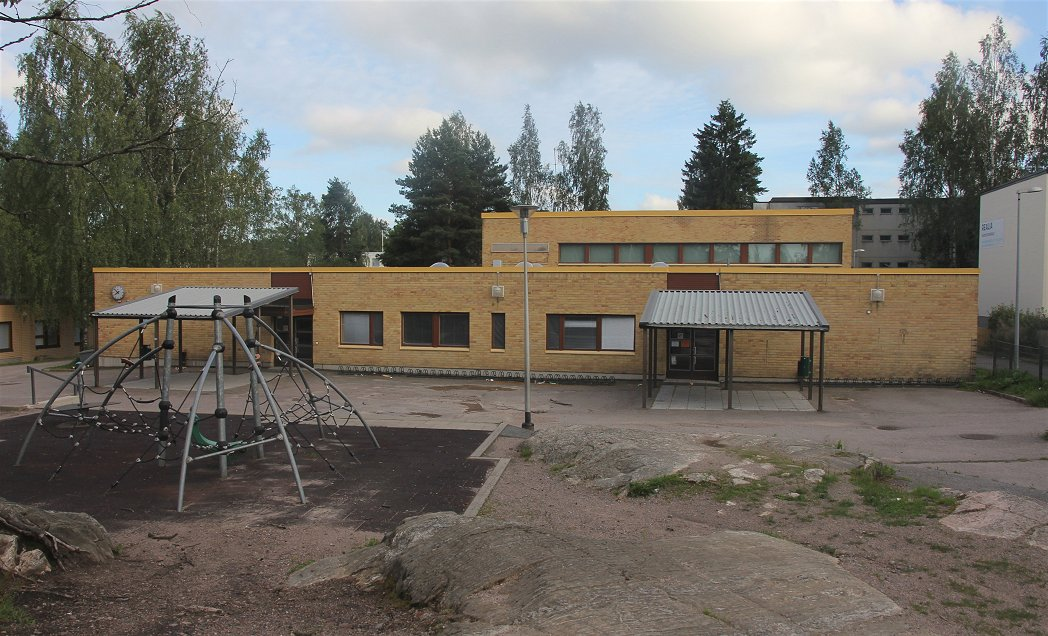 Kulomäen koulu, syyslukukaudesta 2014 alkaen Vierumäen koulun Kulomäen opetuspiste, onVantaan kaupungin Korson kaupunginosan Kulomäen asuinalueella toimiva suomenkielinen alakoulu.